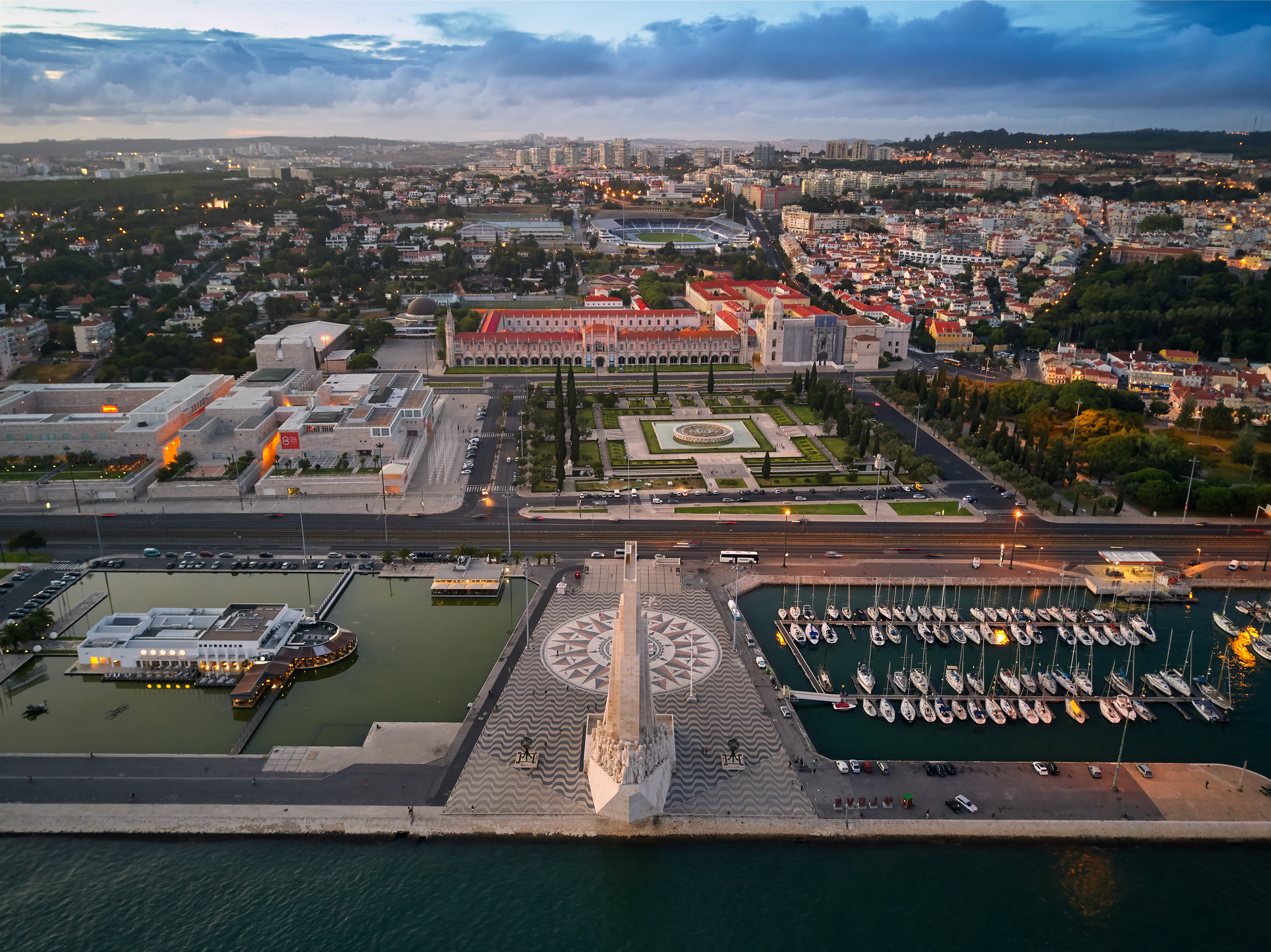 Lisbon